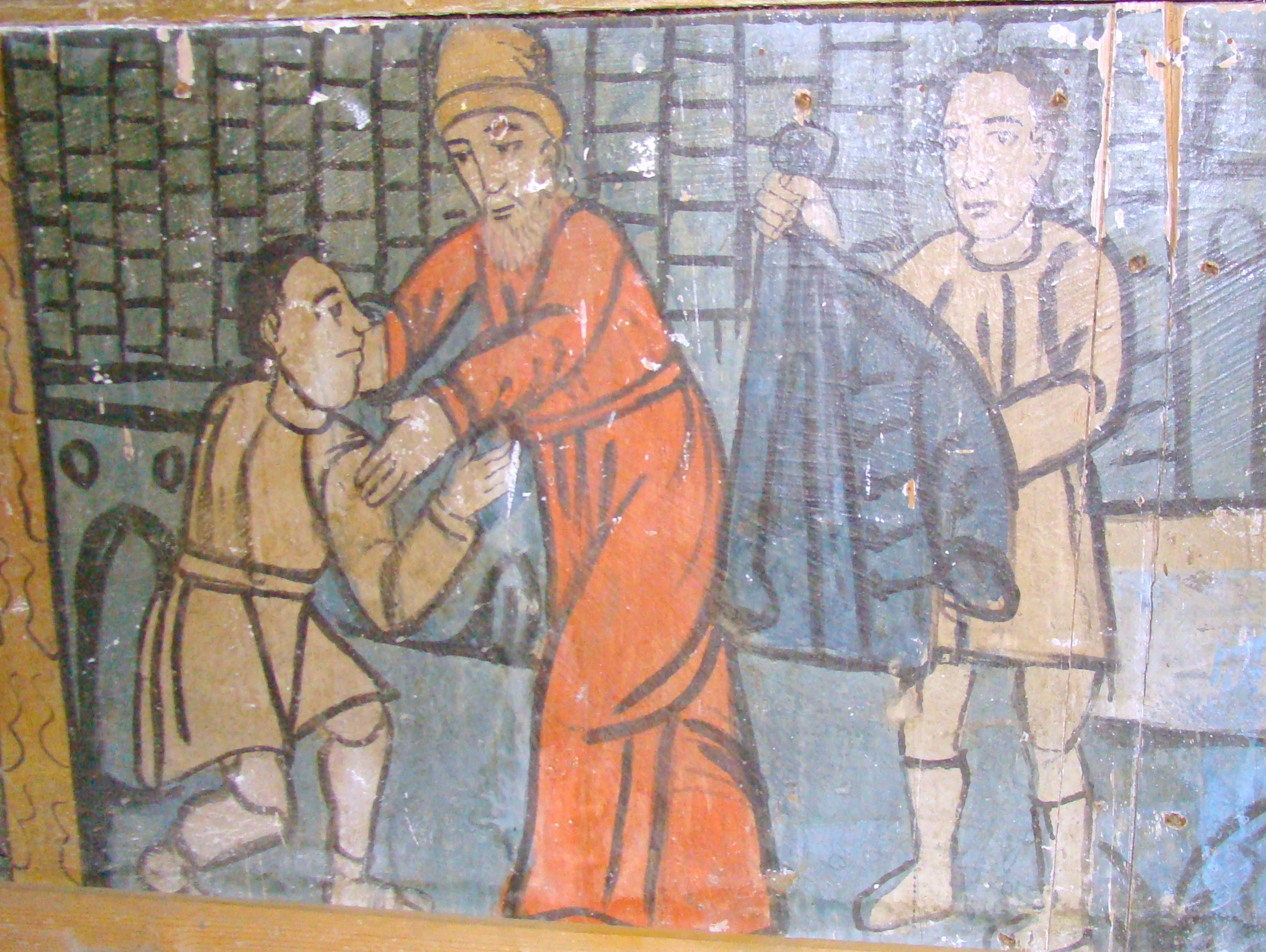 Biserica de lemn „SF.Arhangheli”, sat Culpiu, județul Mureș